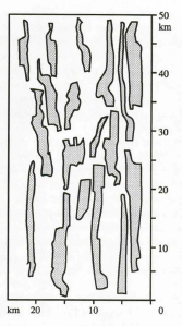 Simulation géostatistique d'un gisement de nodules polymétalliques dans le Pacifique équatorial nord